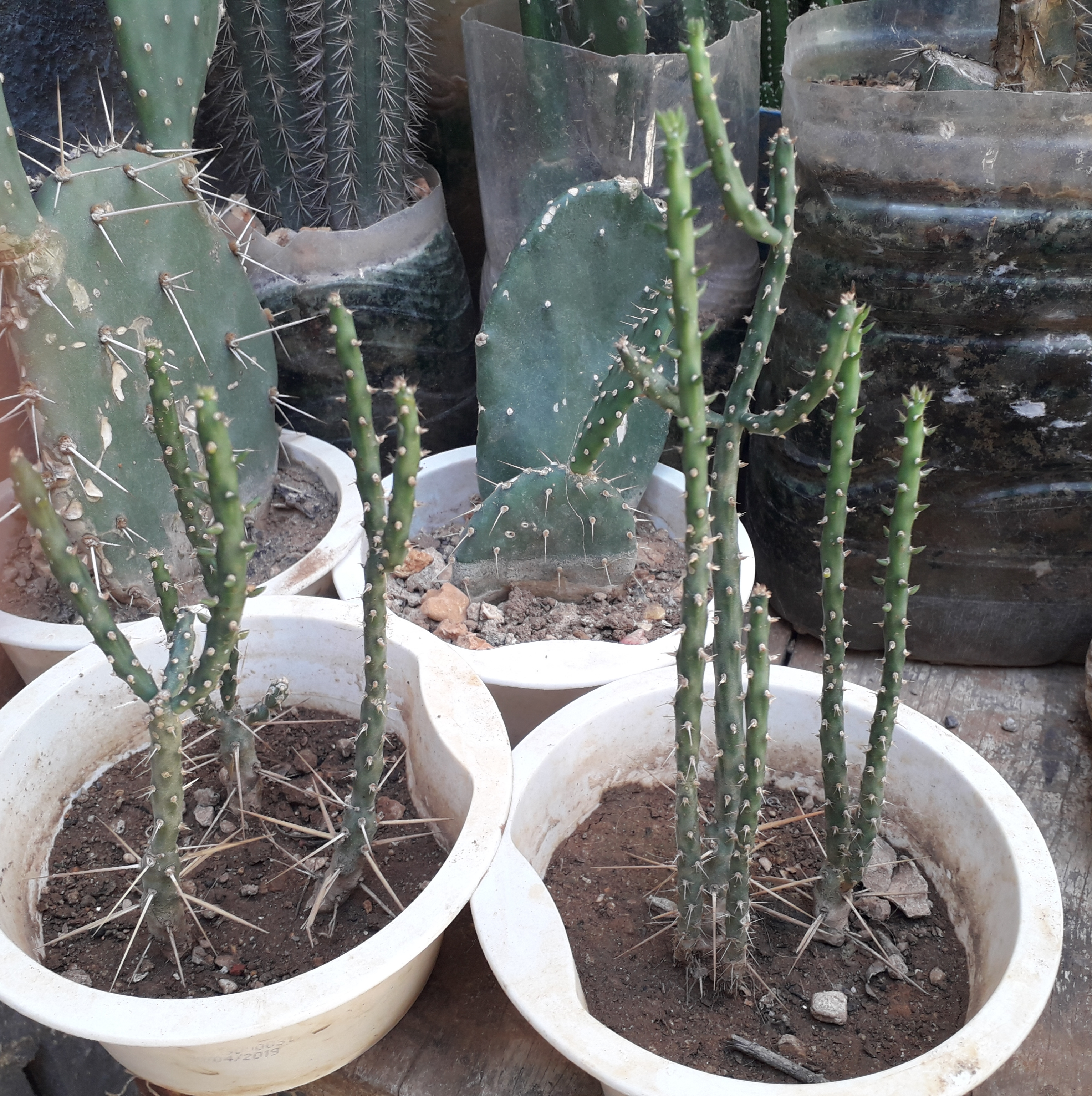 Una Cylindropuntia × vivipara cultivada en mi hogar, Paraguaná Venezuela, tiene 6 meses de edad.